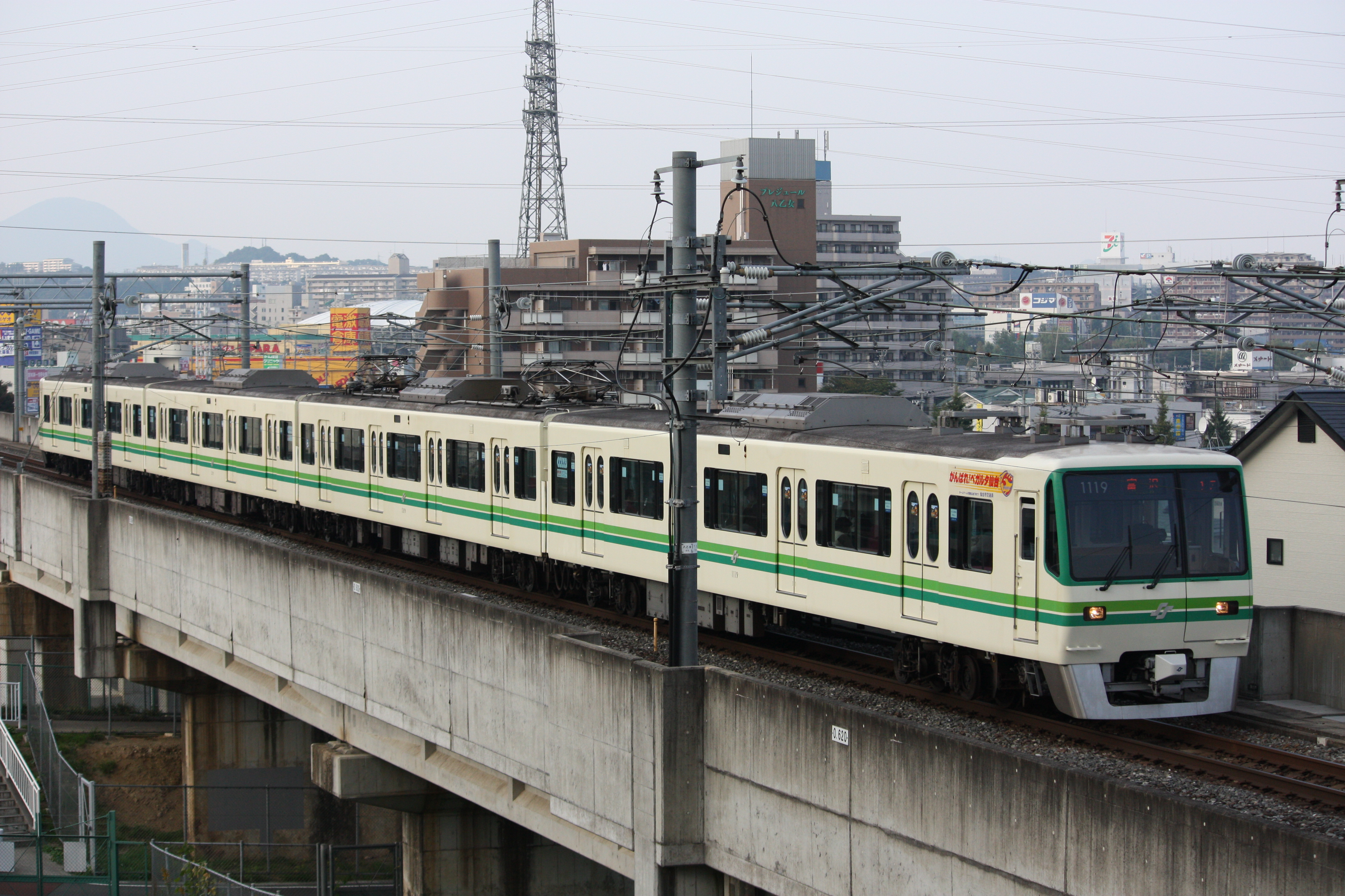 1000N系（八乙女～黒松間にて）